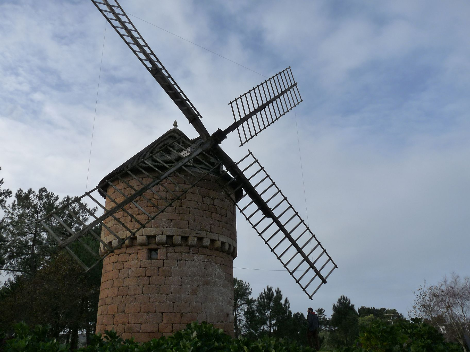 Moulin du Crac'h , commune de Perros-Guirec (Côtes d'Armor).